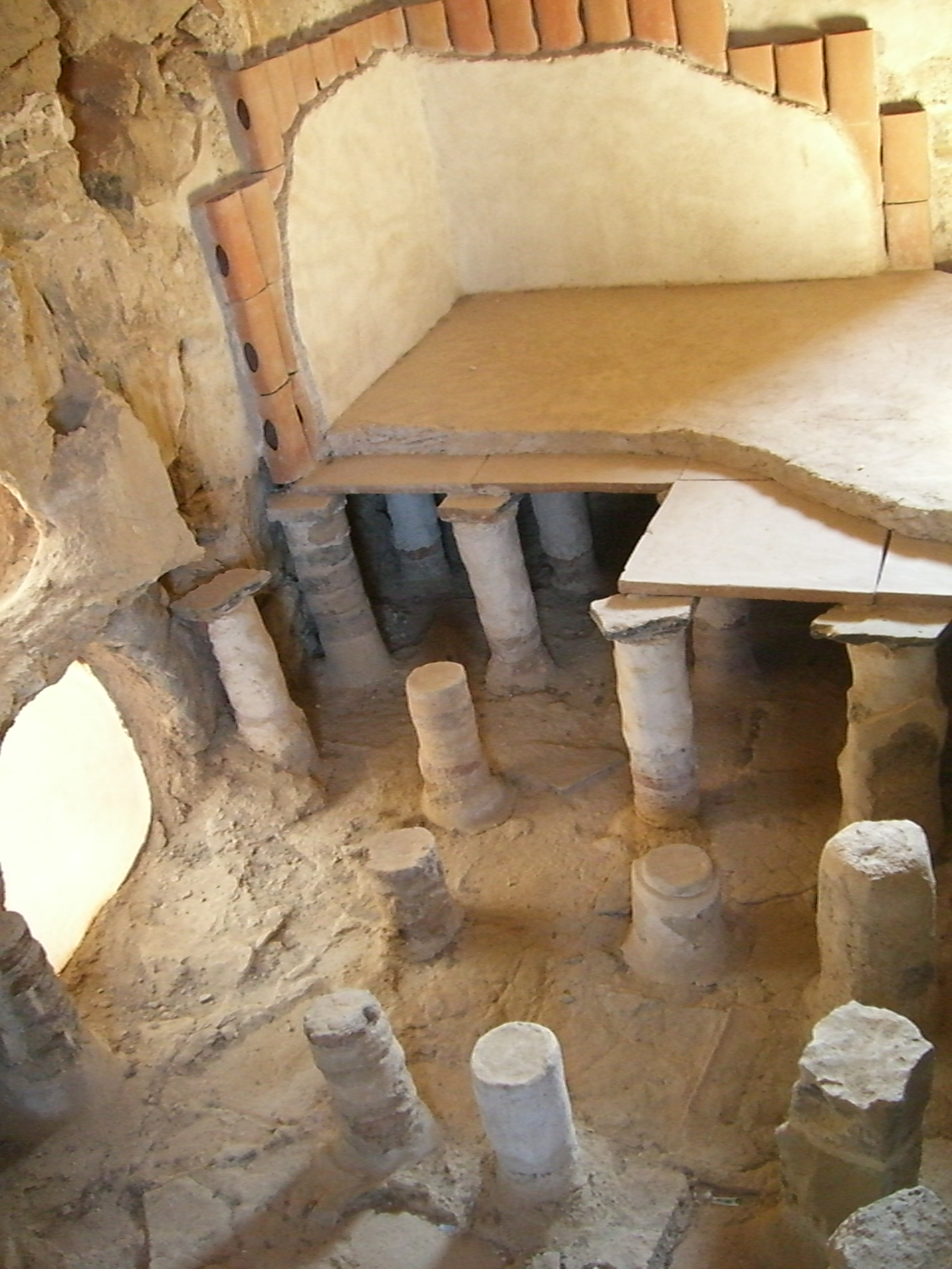 termas en Masada